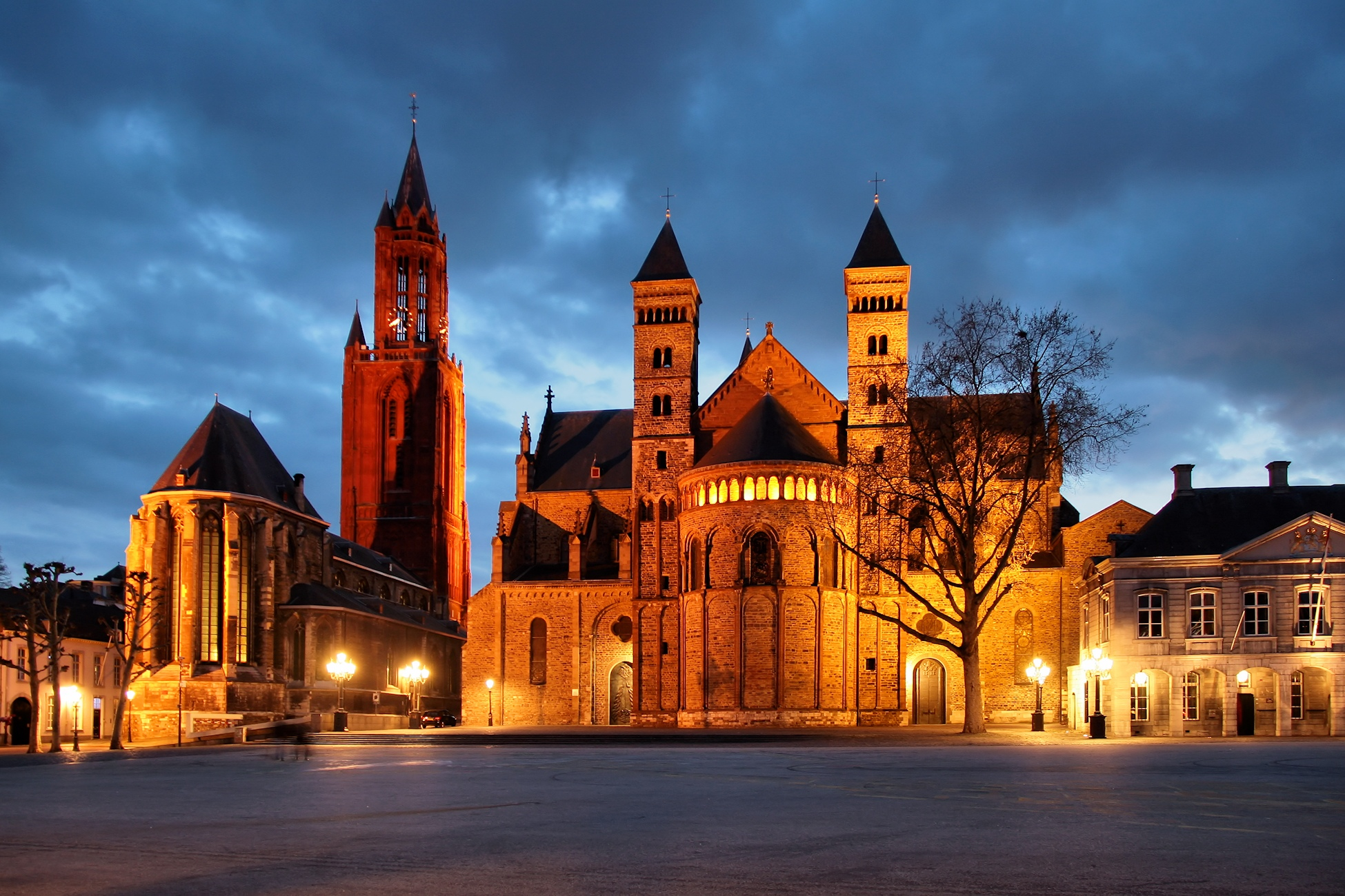 Basiliek Sint Servaas